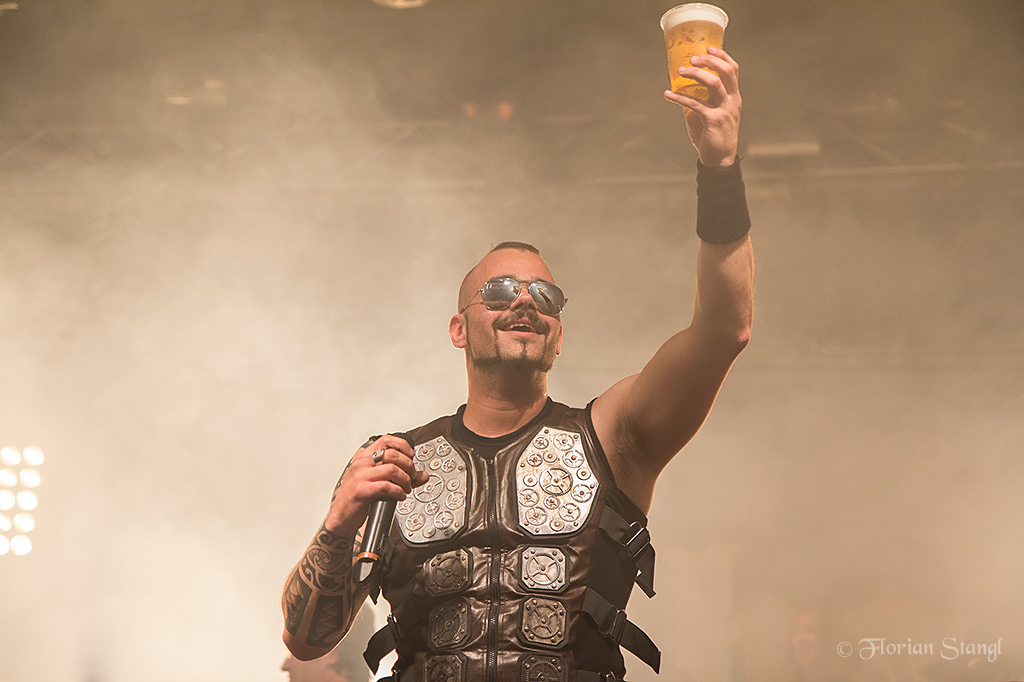 Sabaton 21.9.2012 Geiselwind, Eventhalle